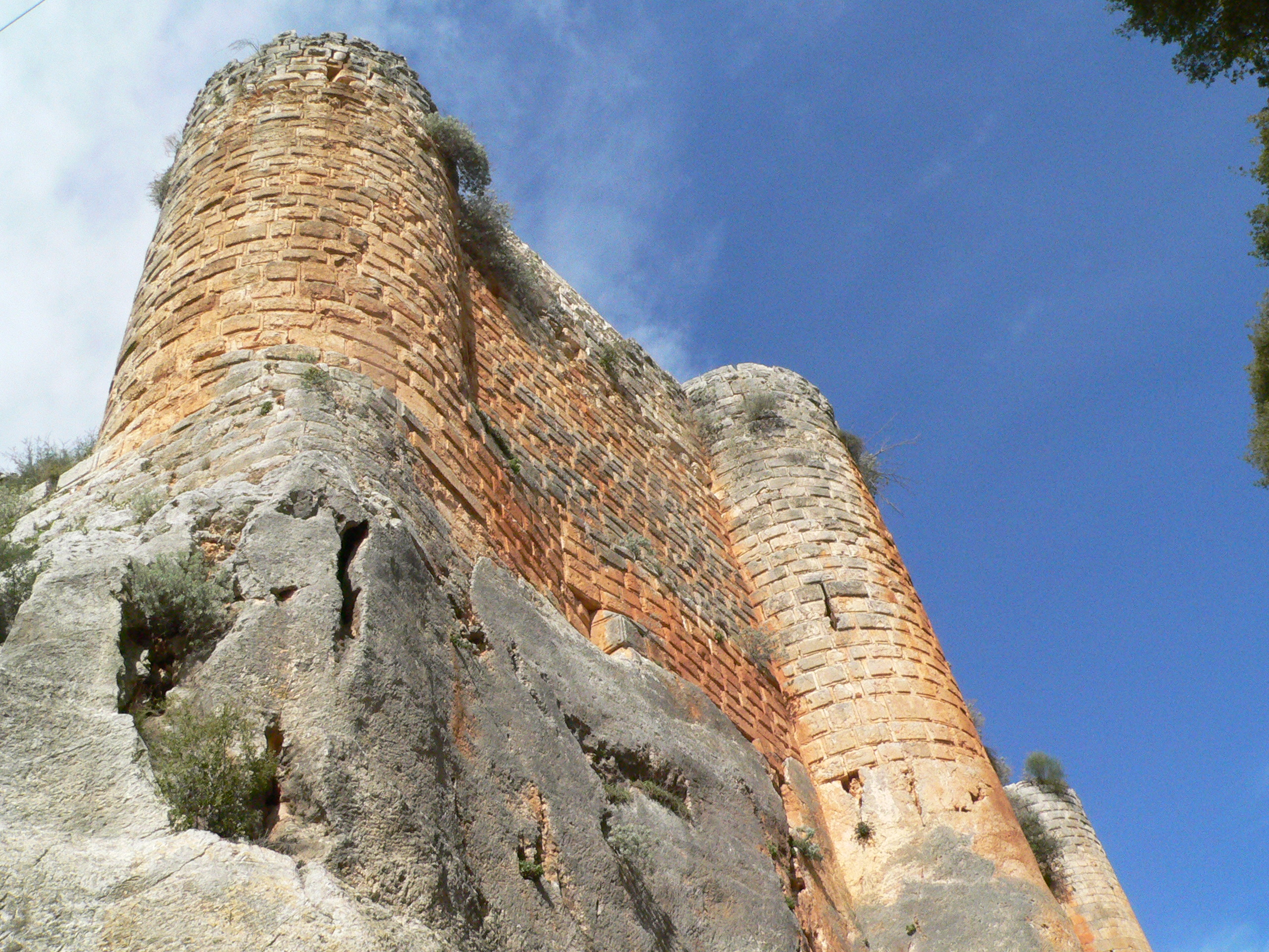 Sala Ed Din Castle M. Disdero 23/02/2005